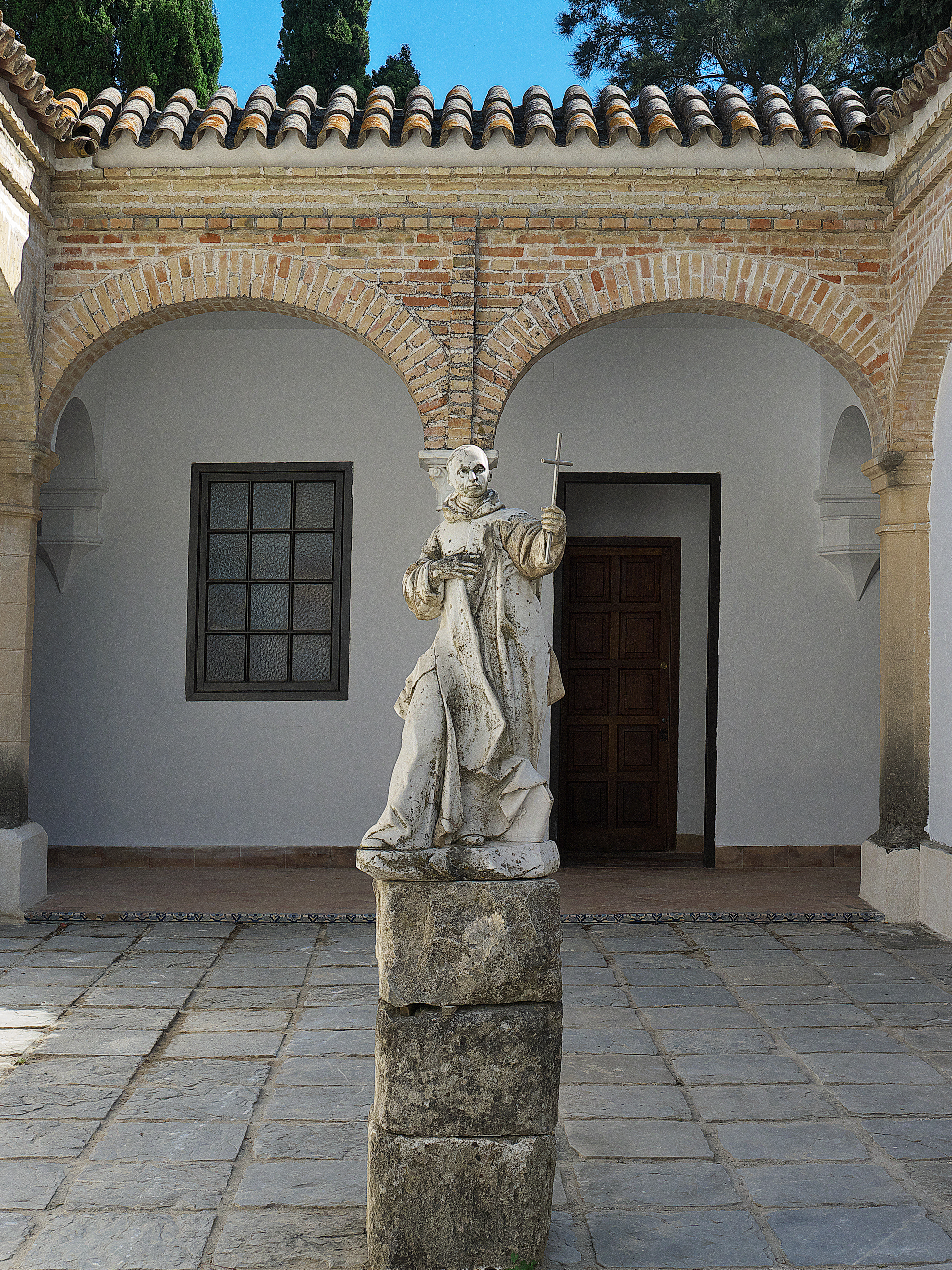 San Bruno de Colonia (1032-1101). Para el que no existía "regla de vida", solo "modelos".